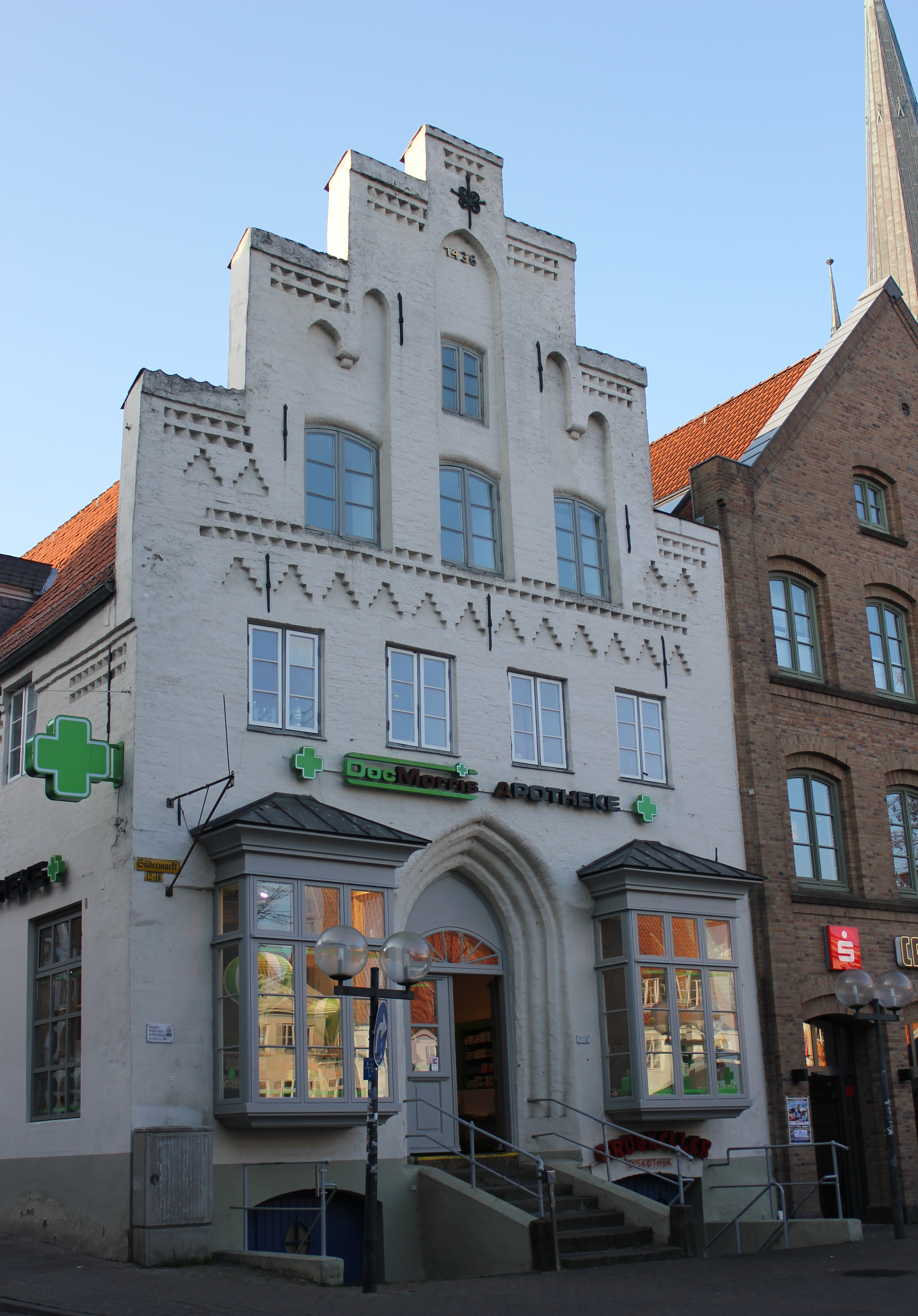 Ältester Profan-Bau in Flensburg, errichtet ca 1490, Südermarkt 12, Apotheke, Bild 1